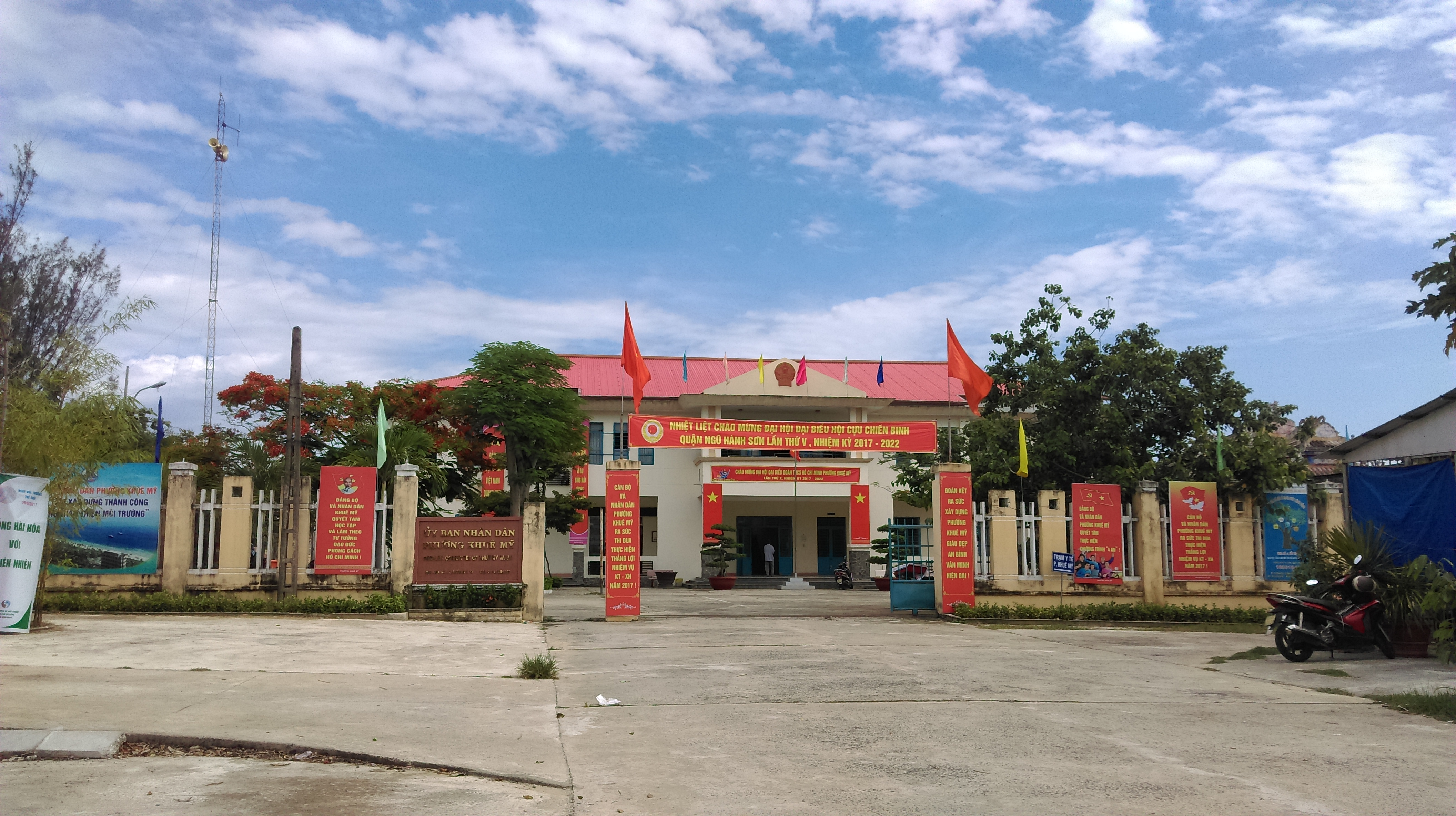 UBND phường Khuê Mỹ, Ngũ Hành Sơn, Đà Nẵng